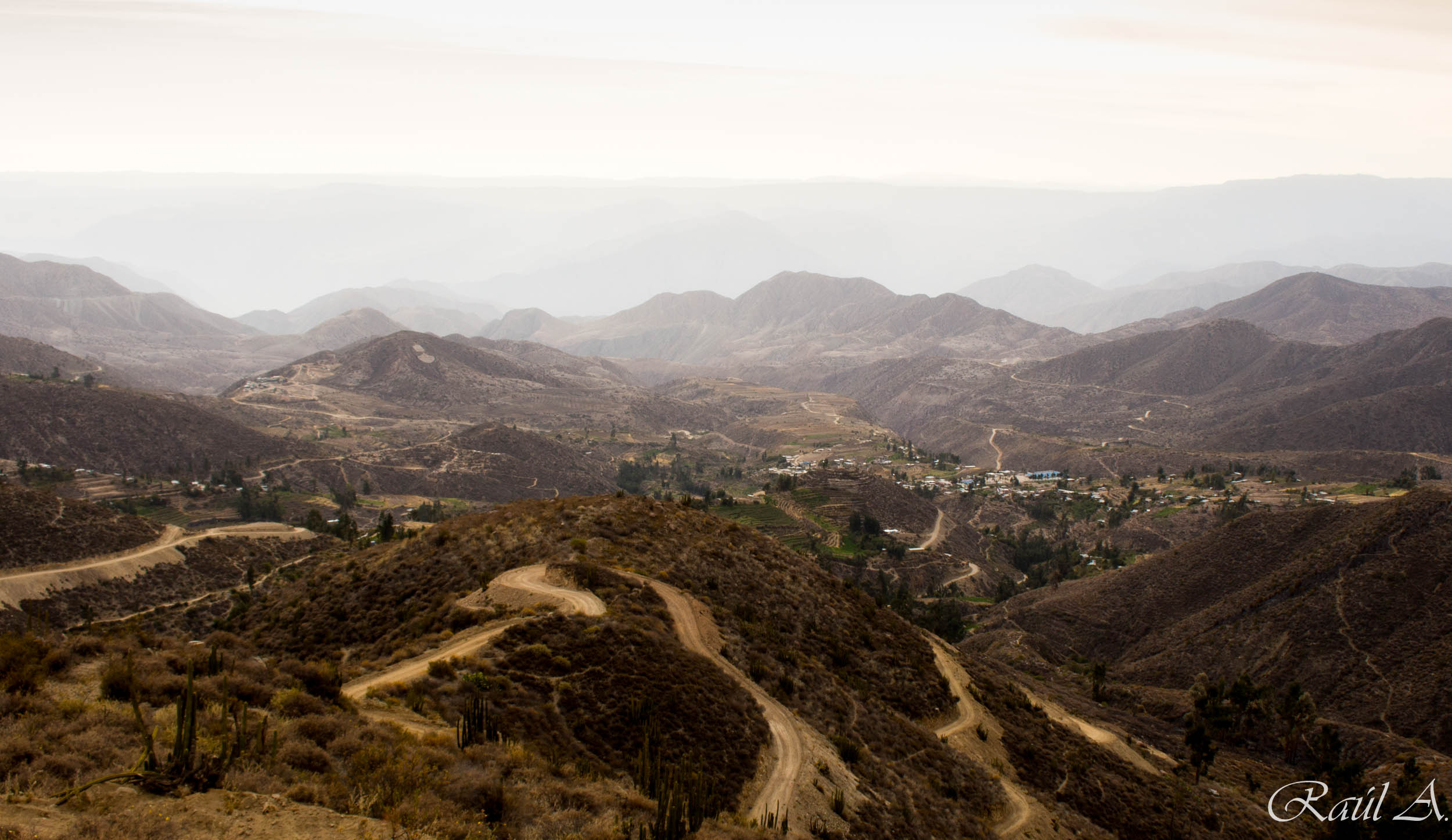 Vista panorámica de la Comunidad Campesina de Ispacas desde los estanques de Santa Cruz